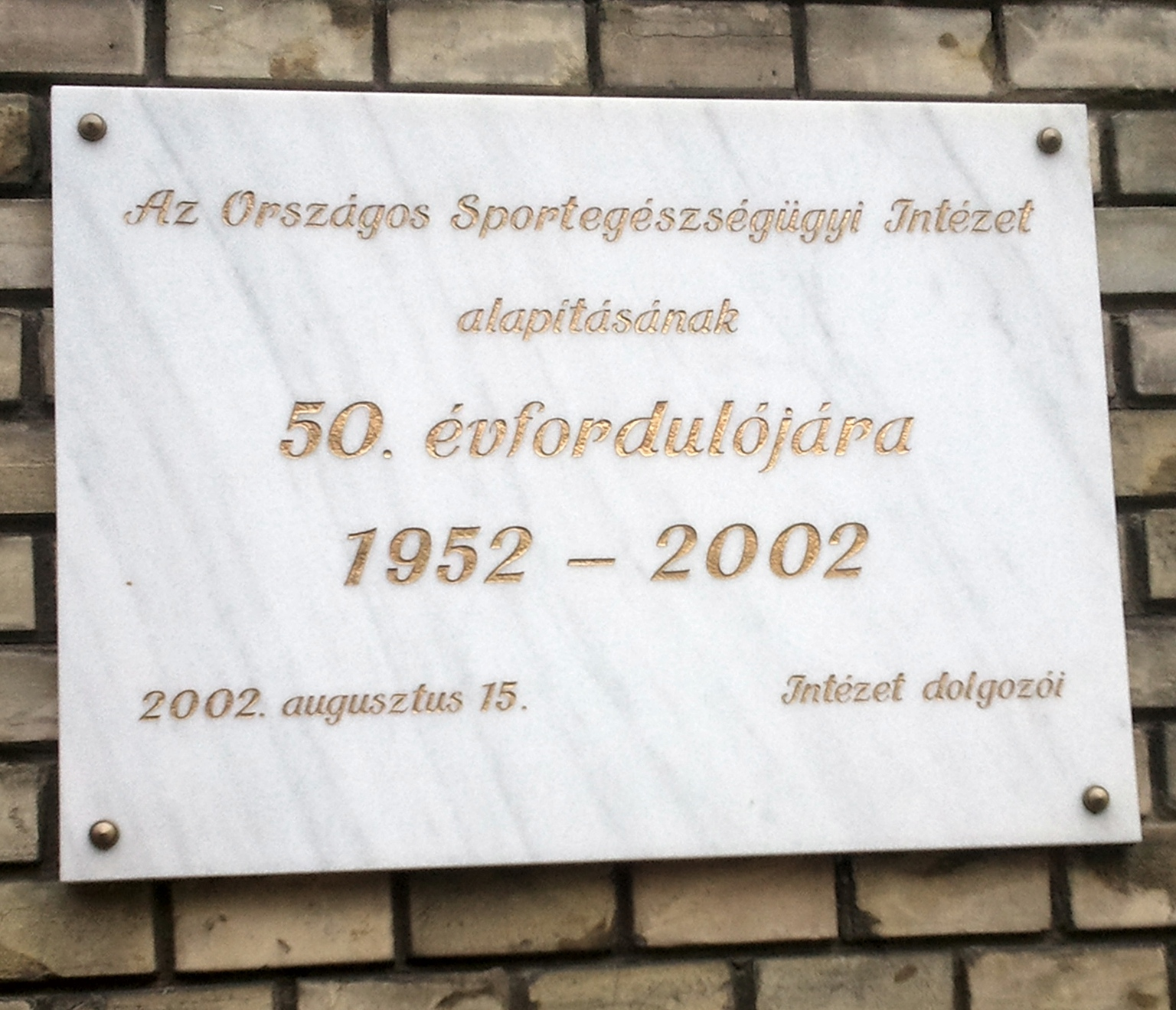 A "Sportkórházban", Országos Sportegészségügyi Intézet megalakulásának 50. évfordulója